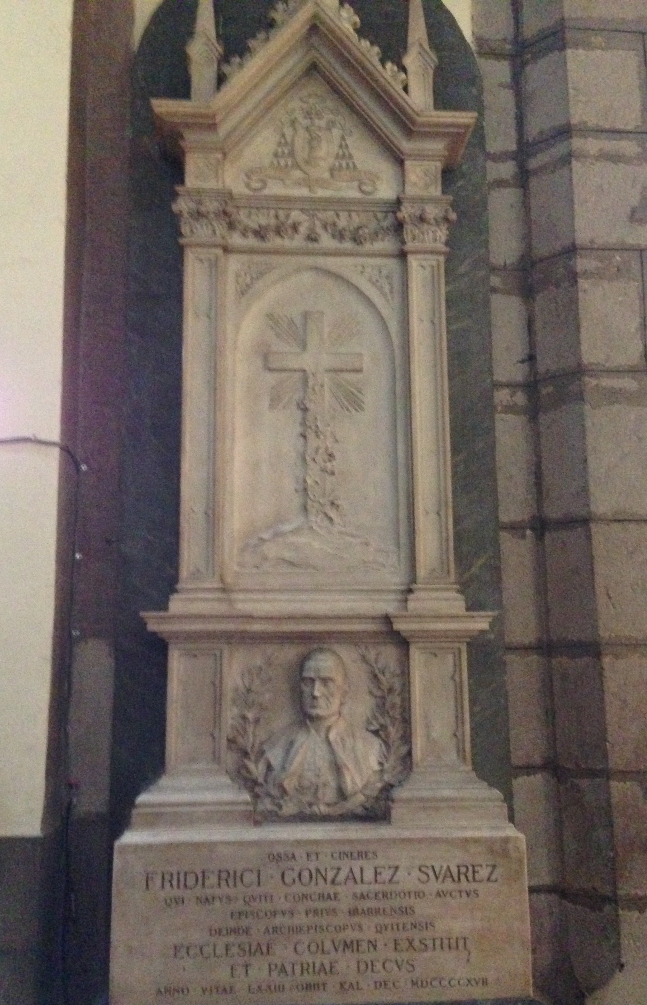 Cenotafio en memoria de Monseñor Federico Gonzalez Suárez en la Catedral Metropolitana de Quito